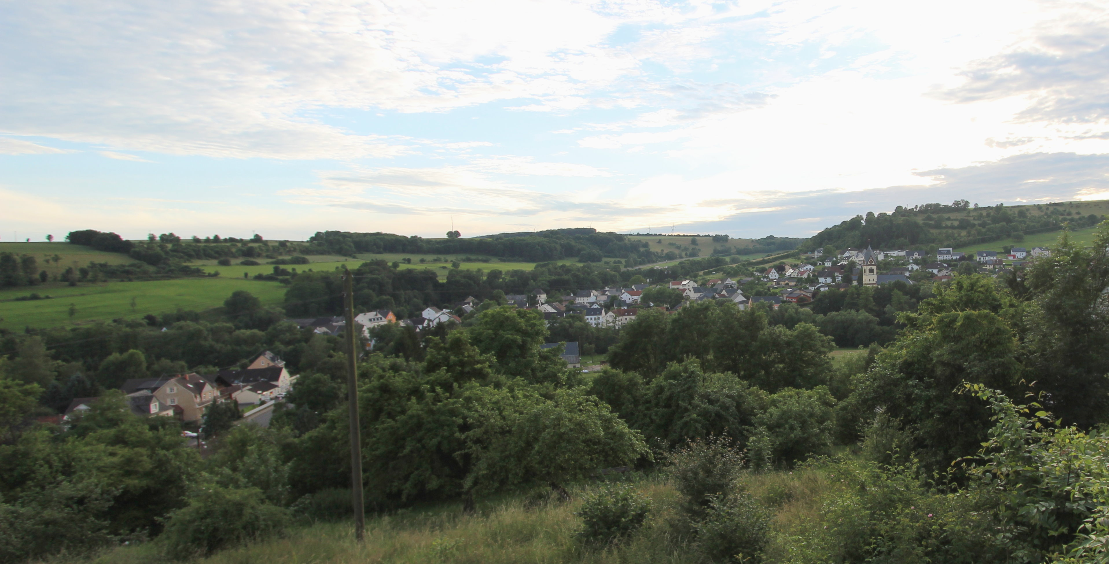 54636 Oberweis in der Eifel; Aufnahme aus Osten (bei Bitburger Straße 18) von 2016.